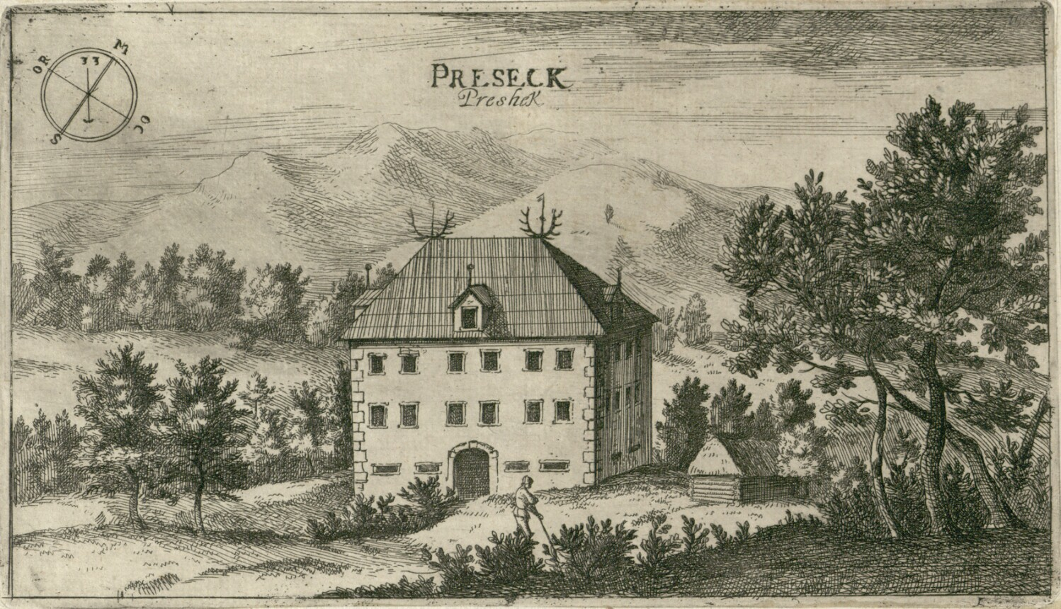 Dvorec Prežek